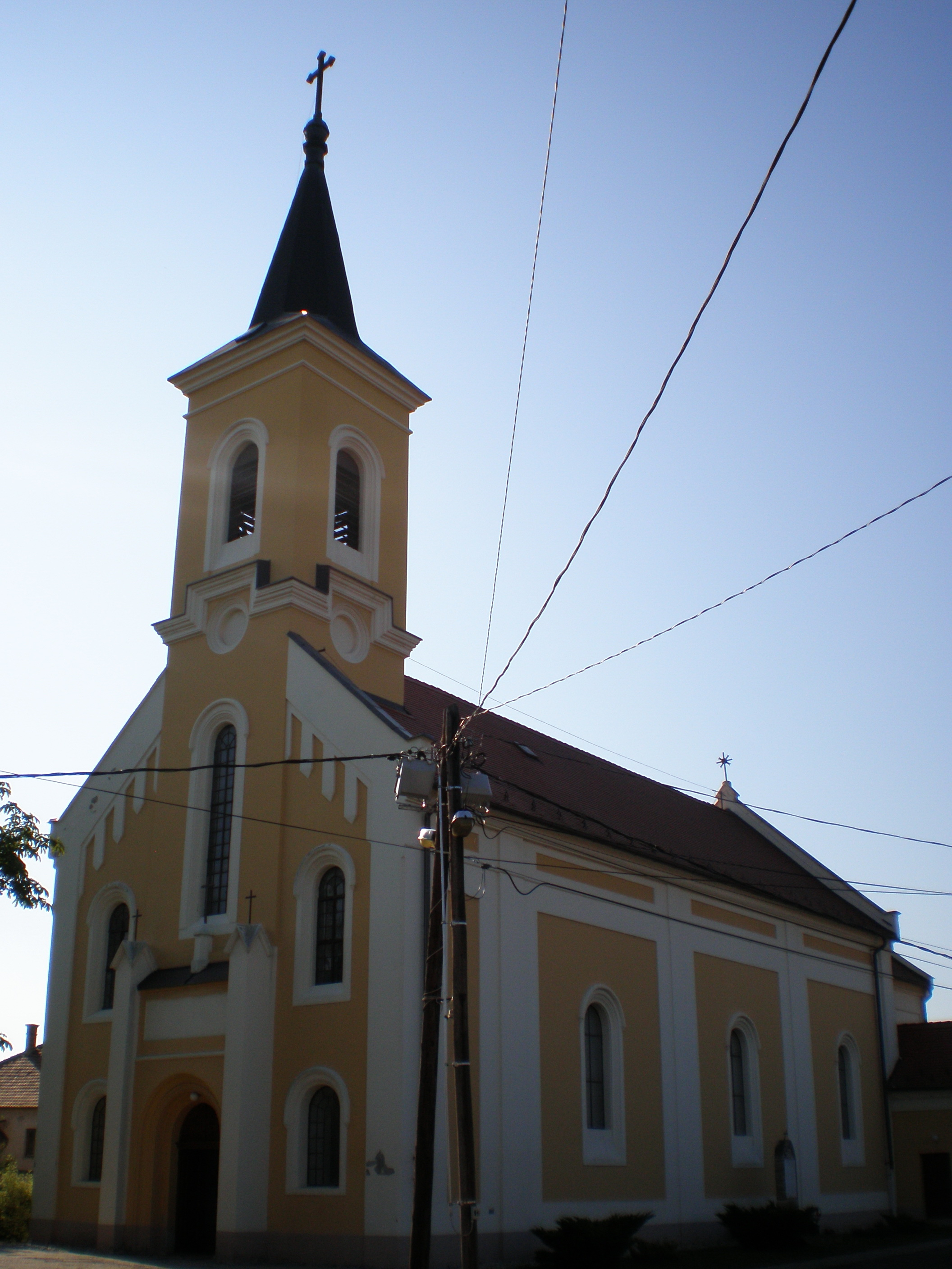 Nagybajcsi római katolikus templom (Nagybajcs, Győr-Moson-Sopron megye, Magyarország)